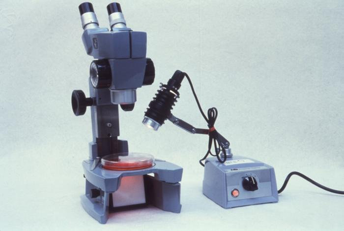 Microscopio usato per esaminare la crescita delle colonie batteriche. Immagine tratta dal Centers for Disease Control and Prevention